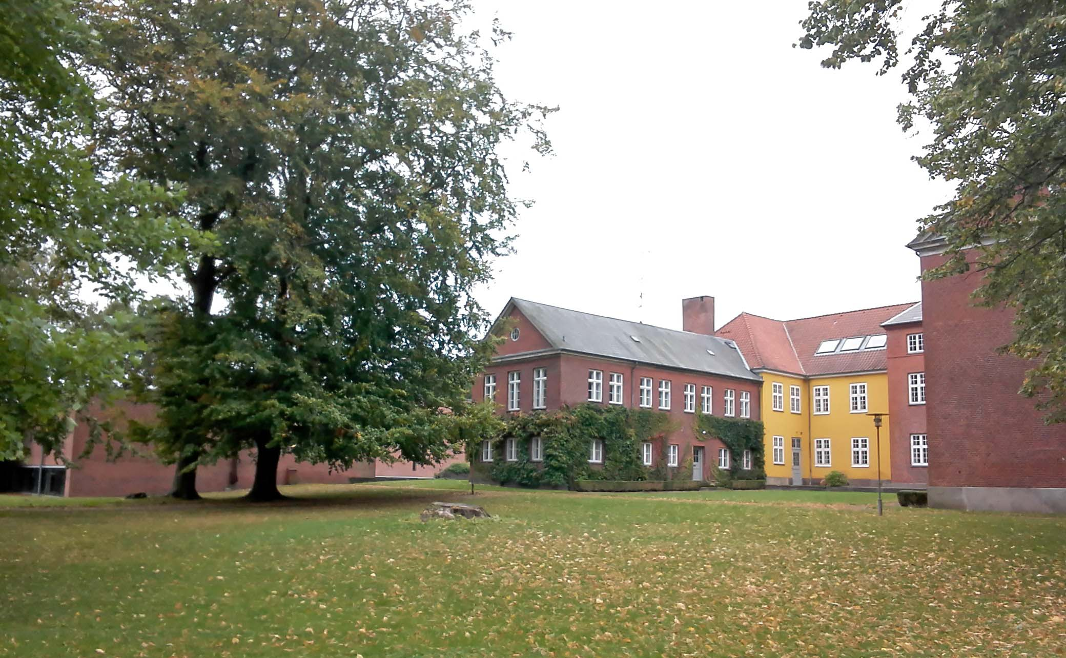 Det tidligere Skårup Seminarium